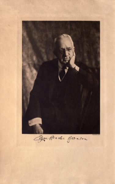 Edgar Beecher Bronson